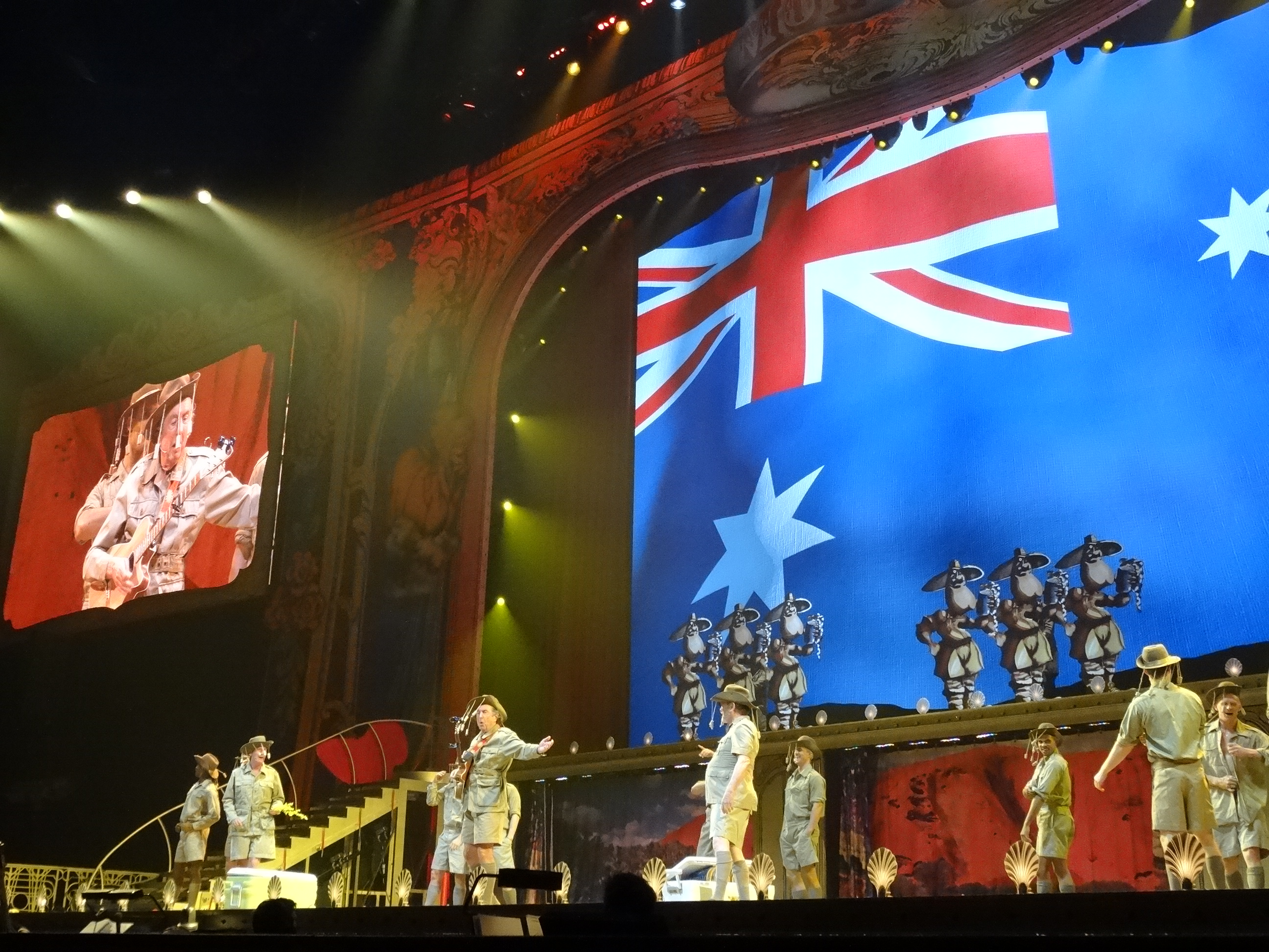 Photo 02-07-14 11 27 25